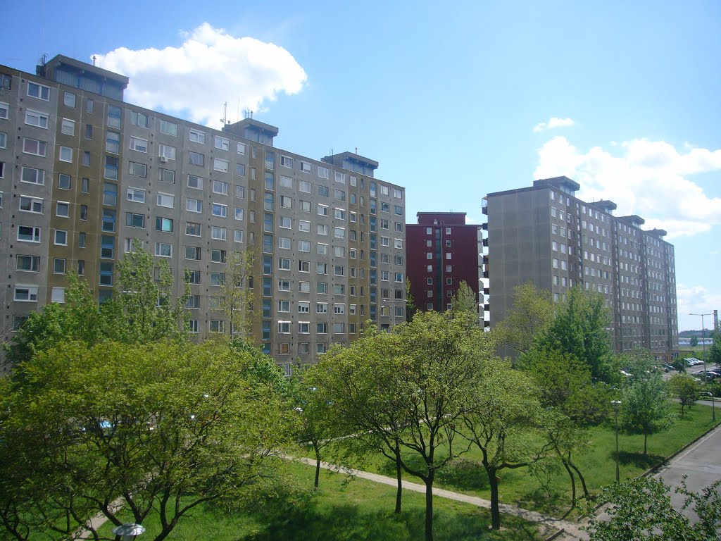 Lakótelep Kőbányán (Budapest, X. ker.)